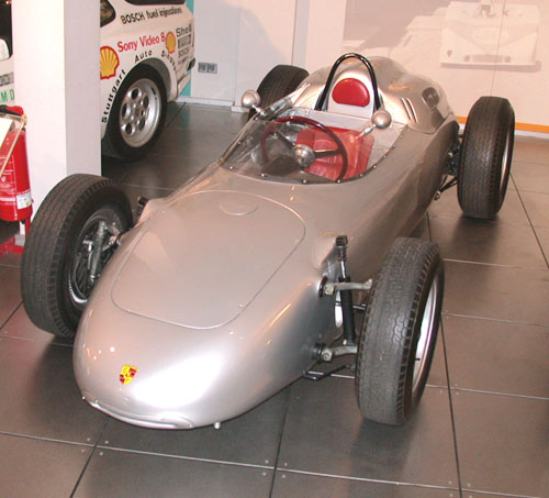 Porsche Typ 718/2 Formel 2 Rennwagen 1960, Porsche Museum, Stuttgart